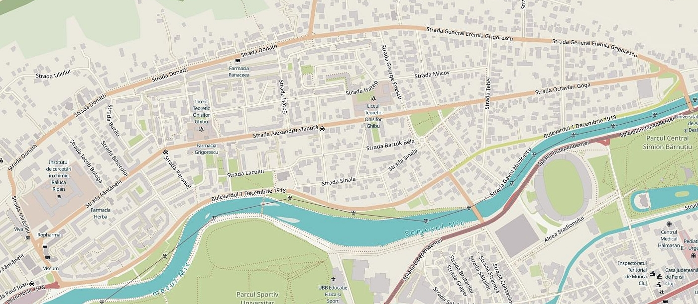 A kolozsvári Donátnegyed térképen This map may be incomplete, and may contain errors. Don't rely solely on it for navigation.